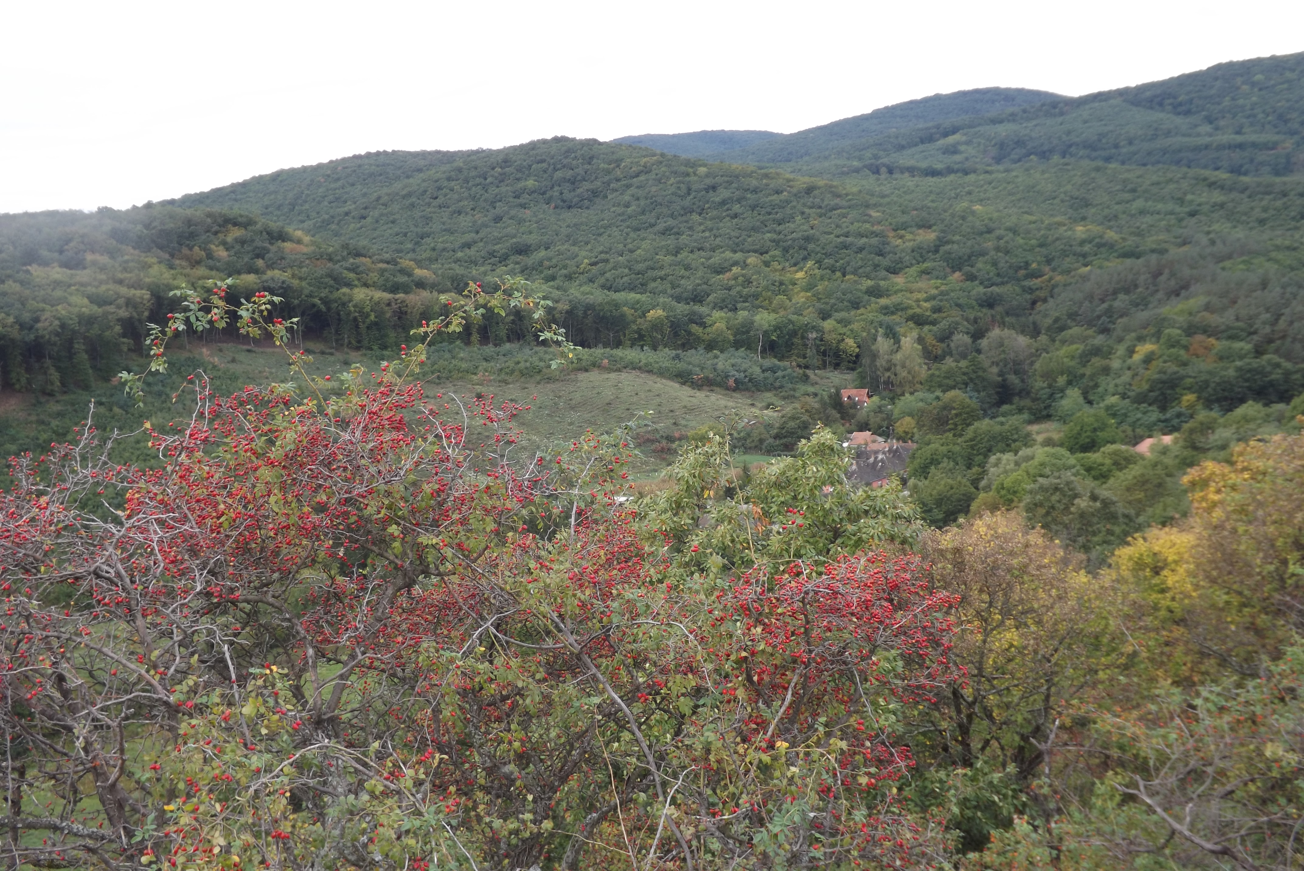 Sály, kilátás Latorvár mellől az alatta elterülő Latorpusztára (Vízfő)